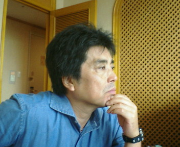 Ryu Murakami(村上龍), Japanese novelist and filmmaker.